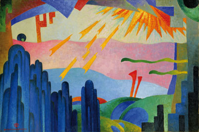 "In principio erat verbum", Gemälde von Joseph Anton Schneiderfranken (Bô Yin Râ)